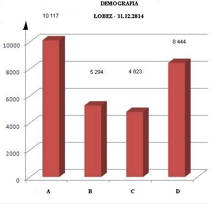 Łobez - demografia. Stan na 31.12.2014 r. Dane wg BIP Łobez[1 ]